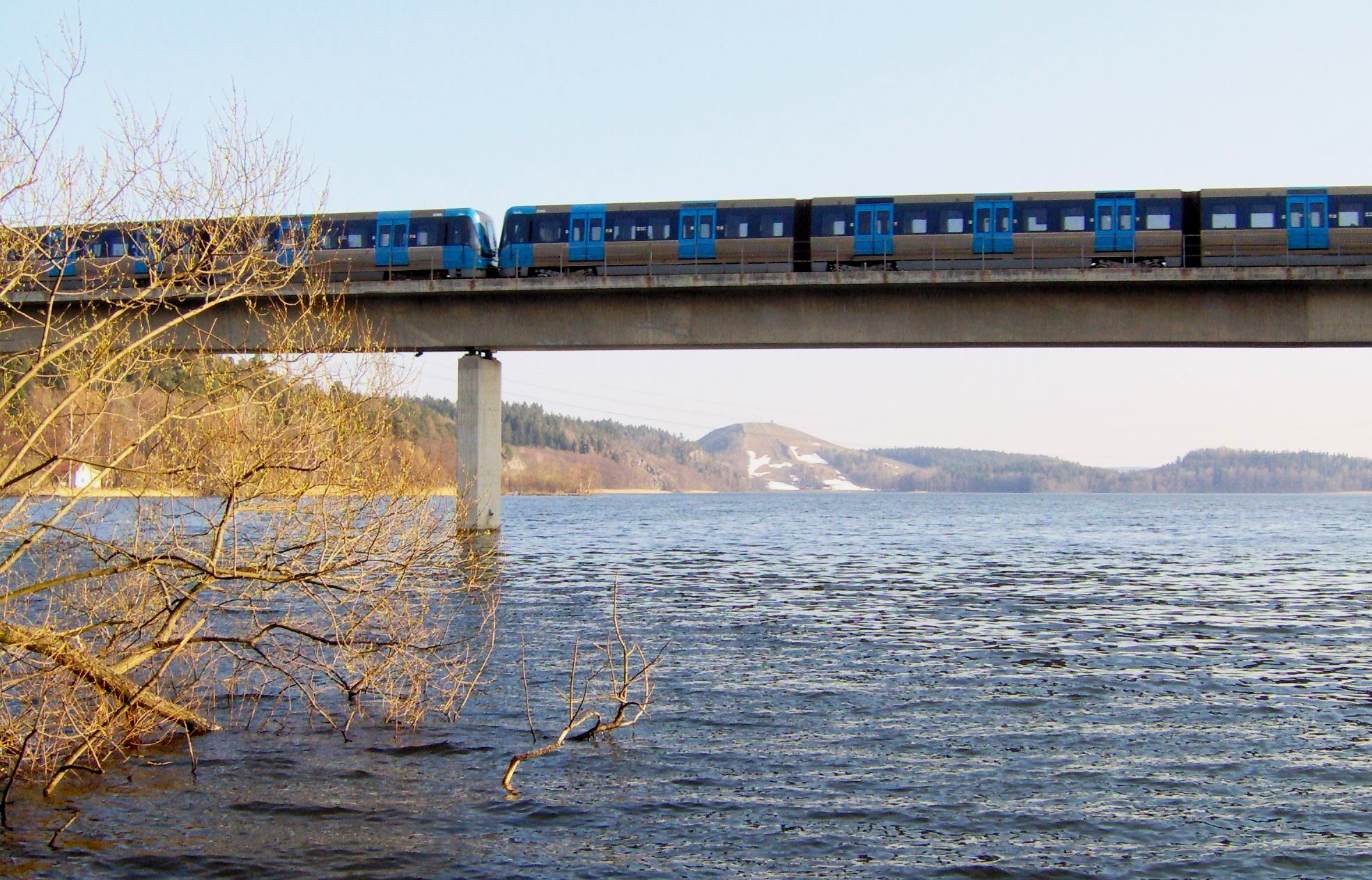 Albysjön mellan Huddinge och Botkyrka kommuner. Albysjön between Huddinge and Botkyrka. Albysjön zwischen Huddinge und Botkyrka.